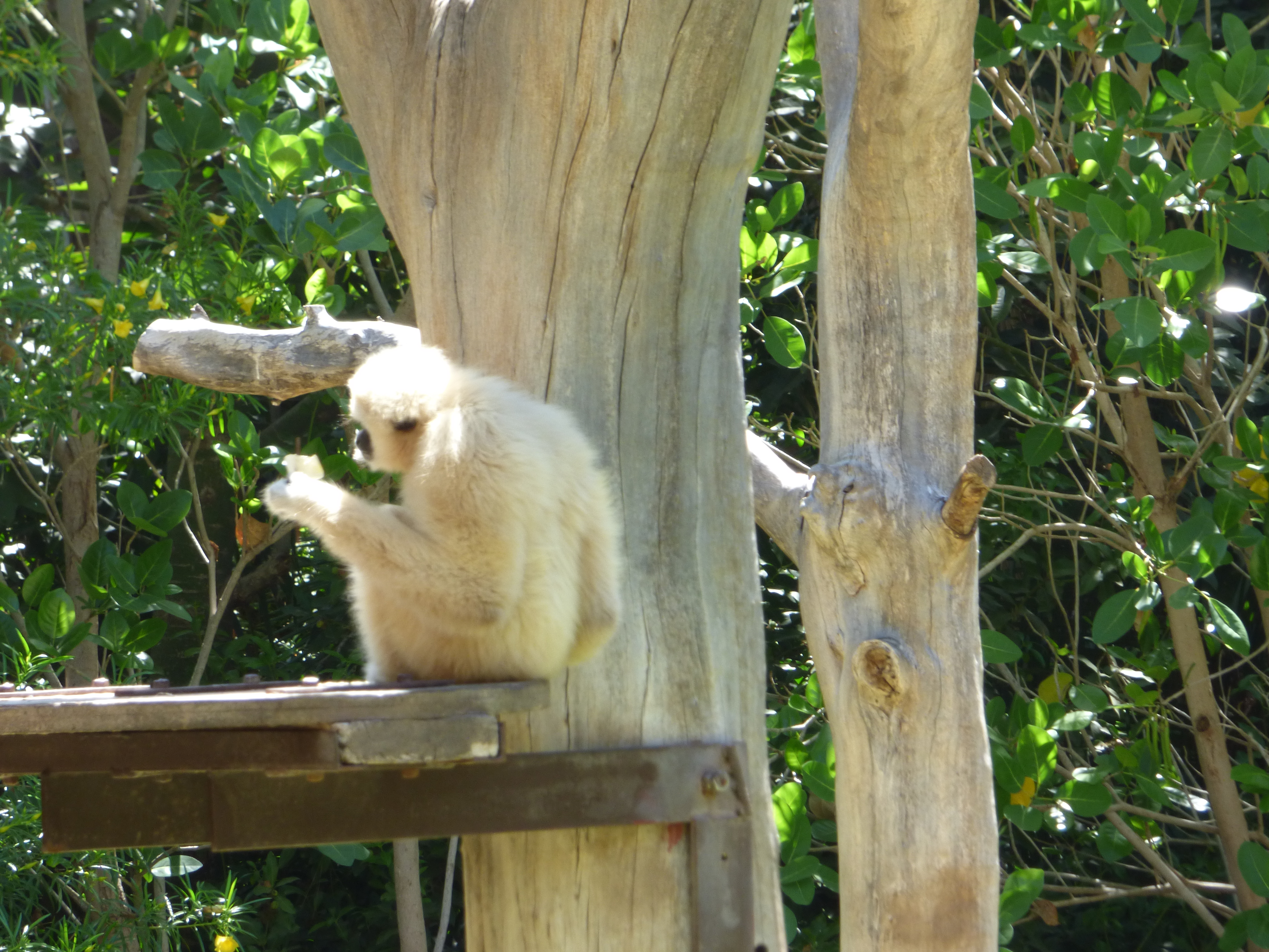 Sitzender Weißhandgibbon